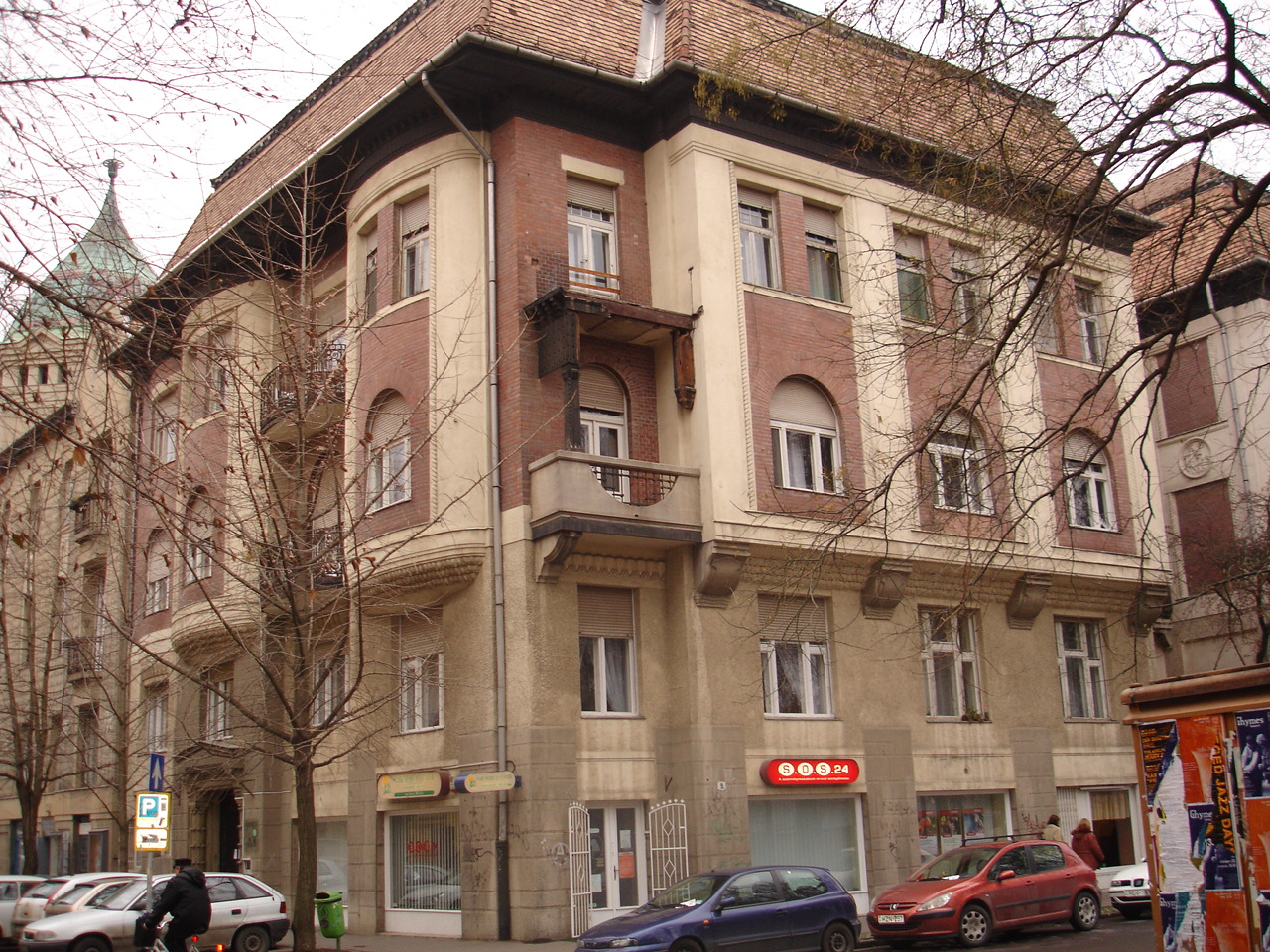 Szeged, Arany János utca 1. sz., Princz-palota, tervezője: Spiegel Frigyes, kivitelező: Erdélyi és Kopasz cég, 1911